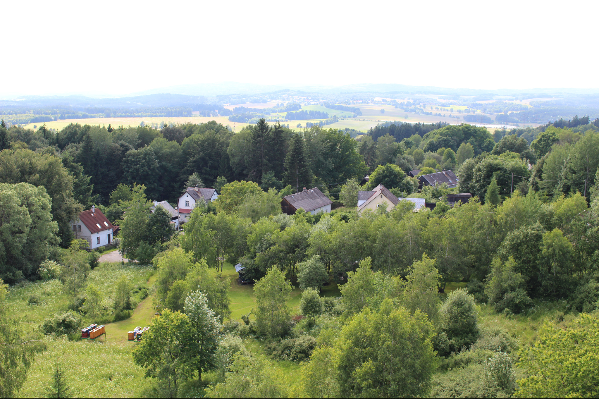 osada Milíře, část obce Rozvadov, okres Tachov, Plzeňský kraj, pohled z rozhledny Milíře